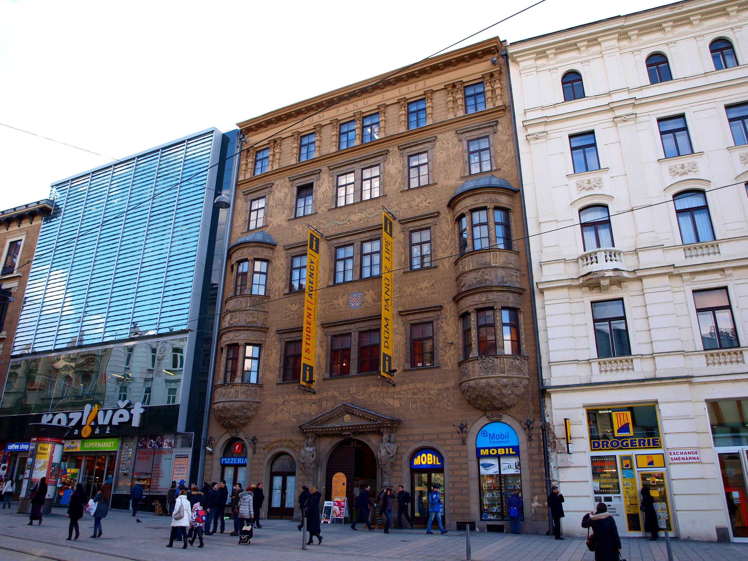 Dům pánů z Lipé, Brno